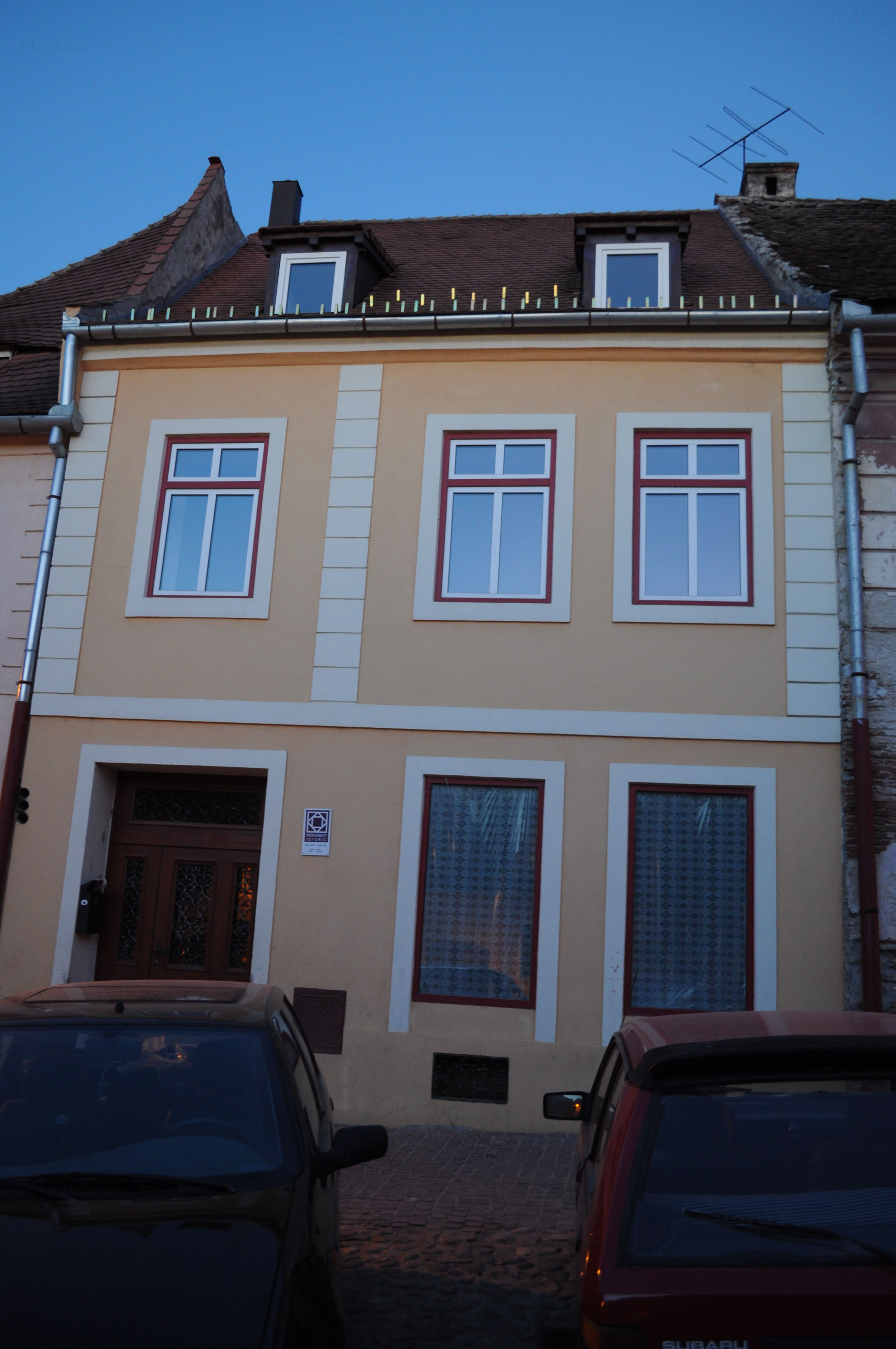 Casa - vedere frontala, Piața Aurarilor 8